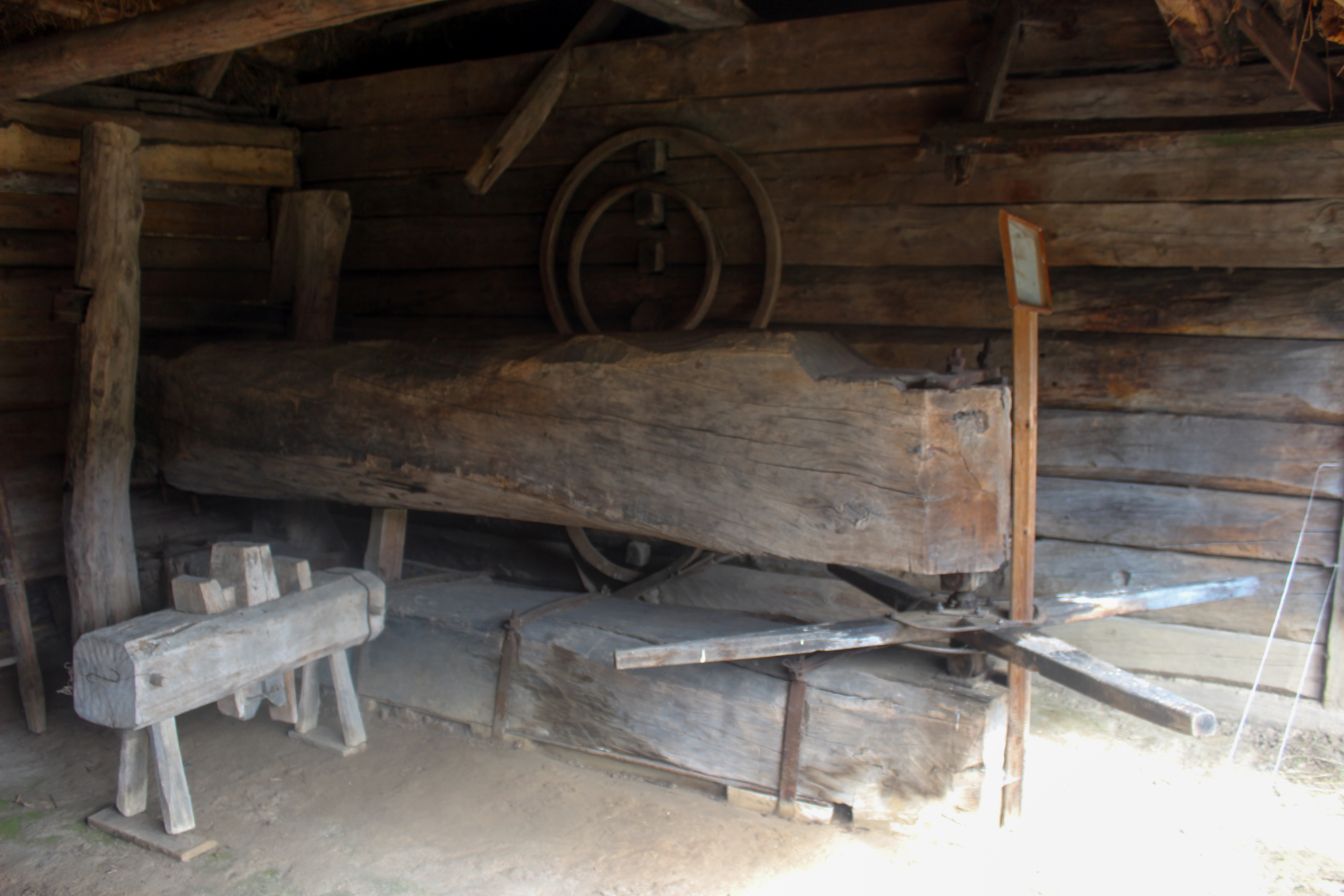 Окружний двір із села Солов'ї Старовижівського району Волинської області, Київ, Пирогів